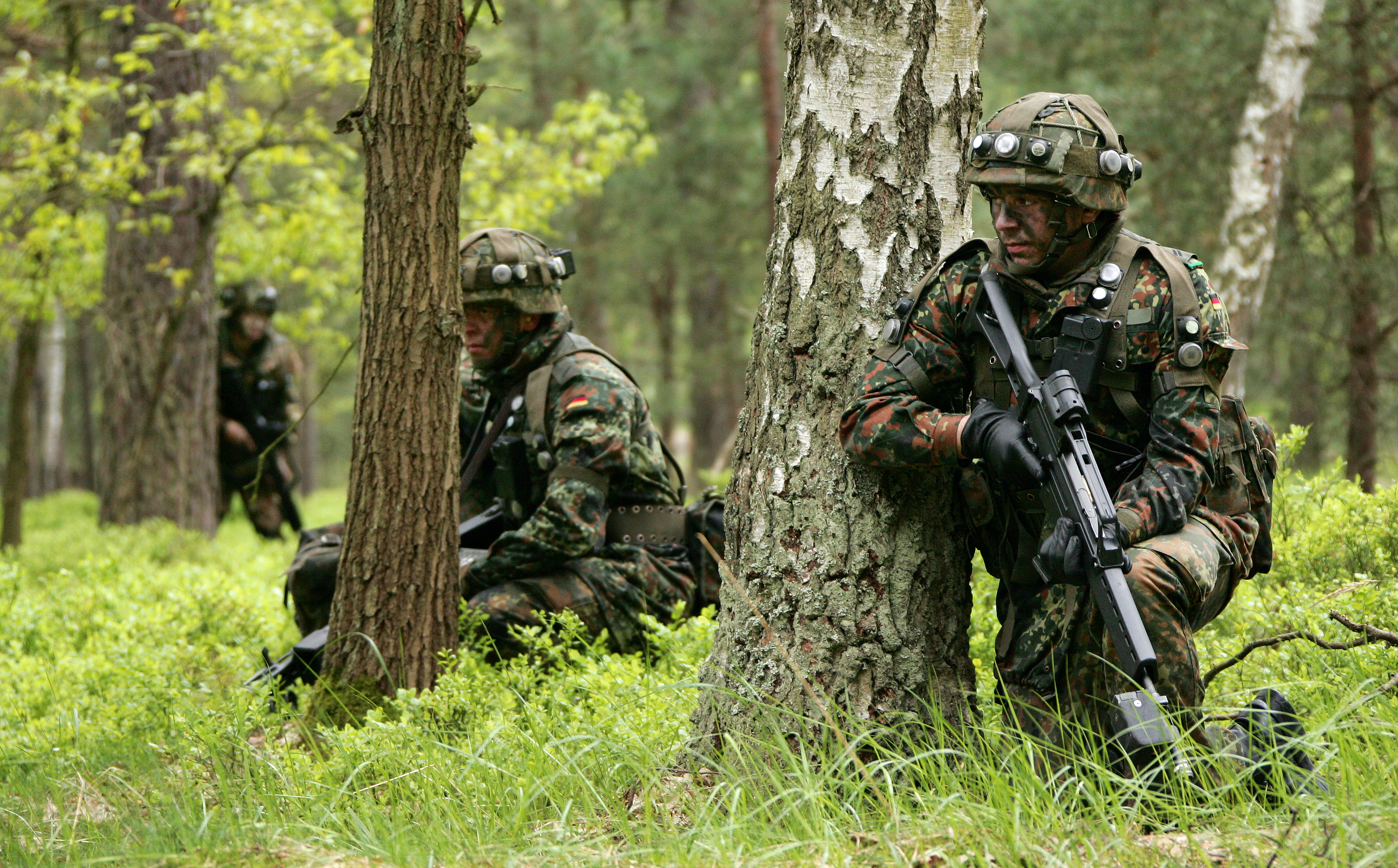 Panzergrenadiere bei einer Übung mit dem Ausbildungsgerät Duellsimulator, kurz AGDUS, auf dem Truppenübungsplatz Jägerbrück bei Torgelow (Mecklenburg-Vorpommern). ©Bundeswehr/S.Wilke